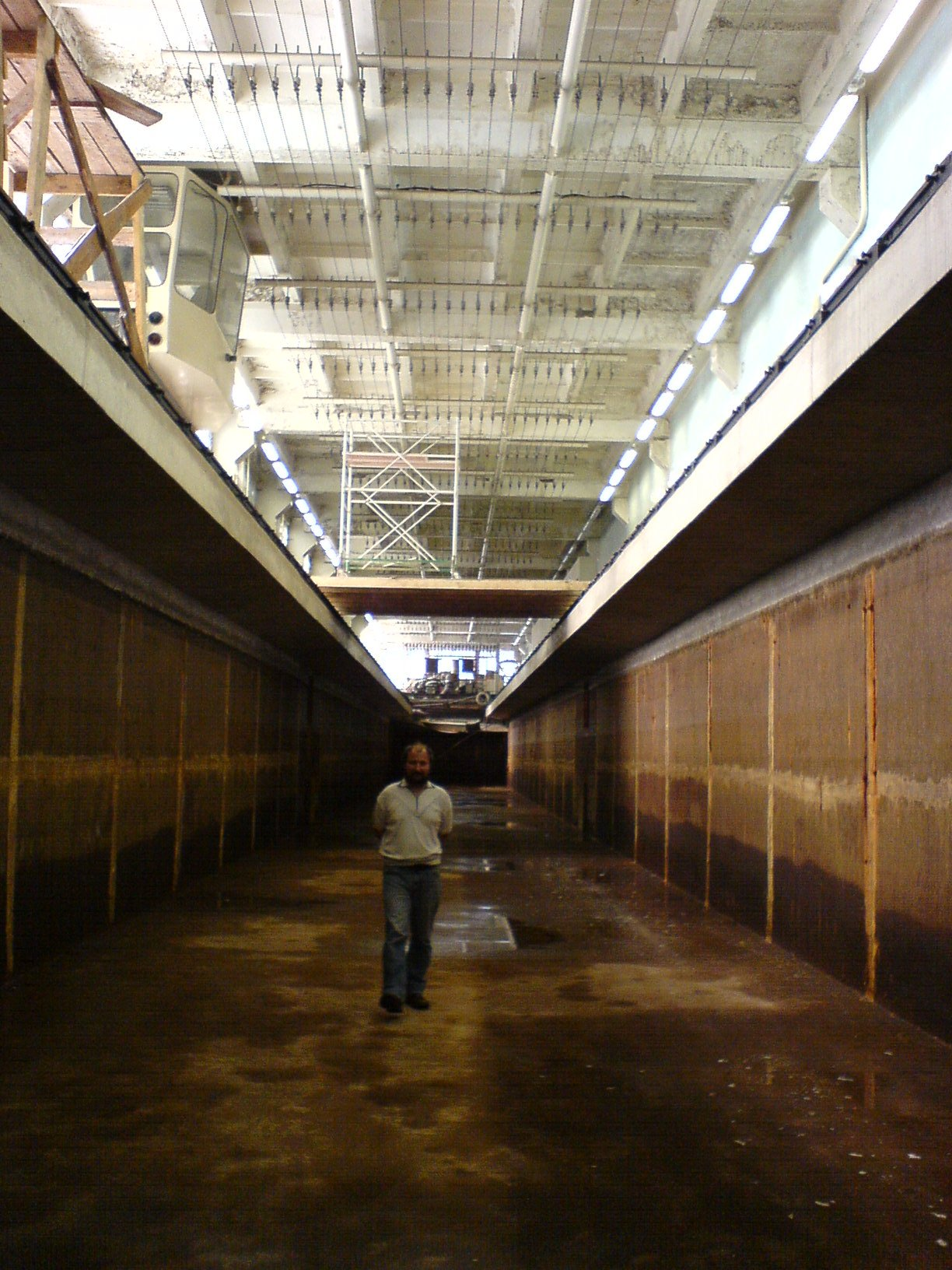 Бассейн СПГУВК без воды